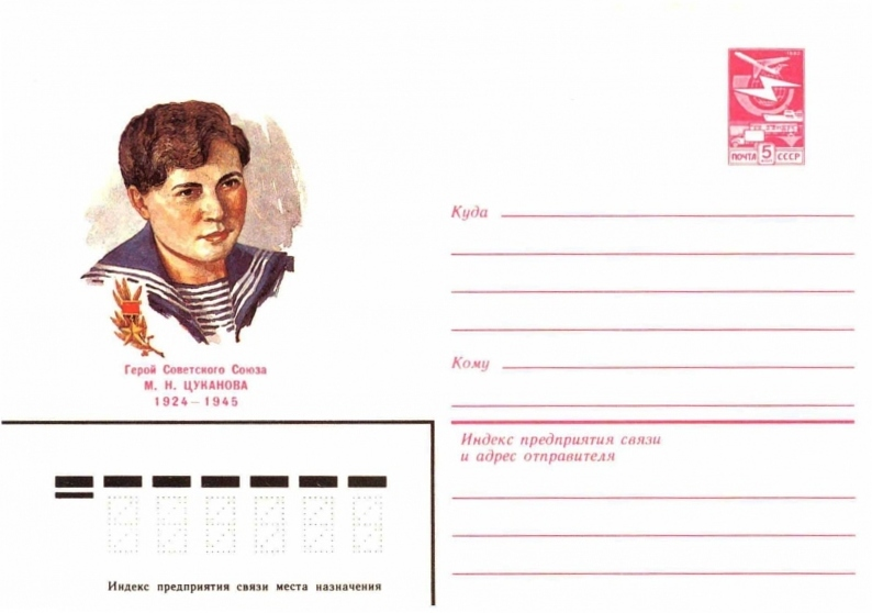 Художественные маркированные конверты 1983 года.